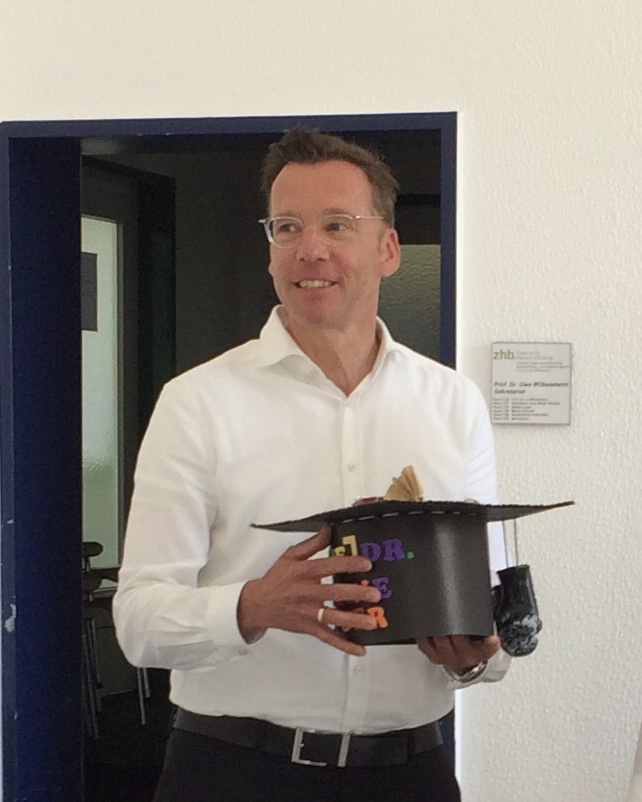 Bild von Uwe Wilkesmann